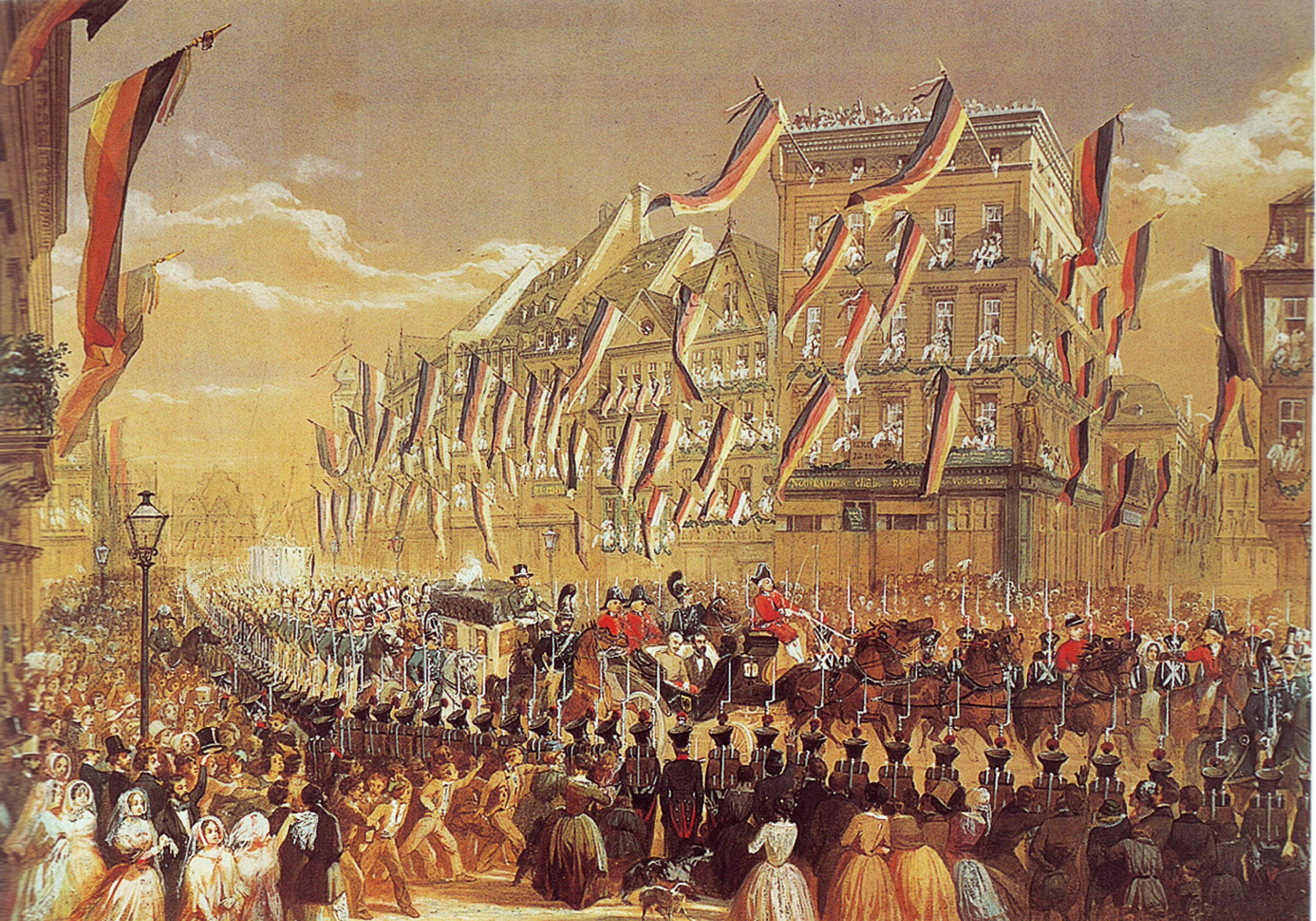 Aquarell, 1848. “Einzug des Reichsverwesers Erzherzog Johann in Frankfurt am Main”